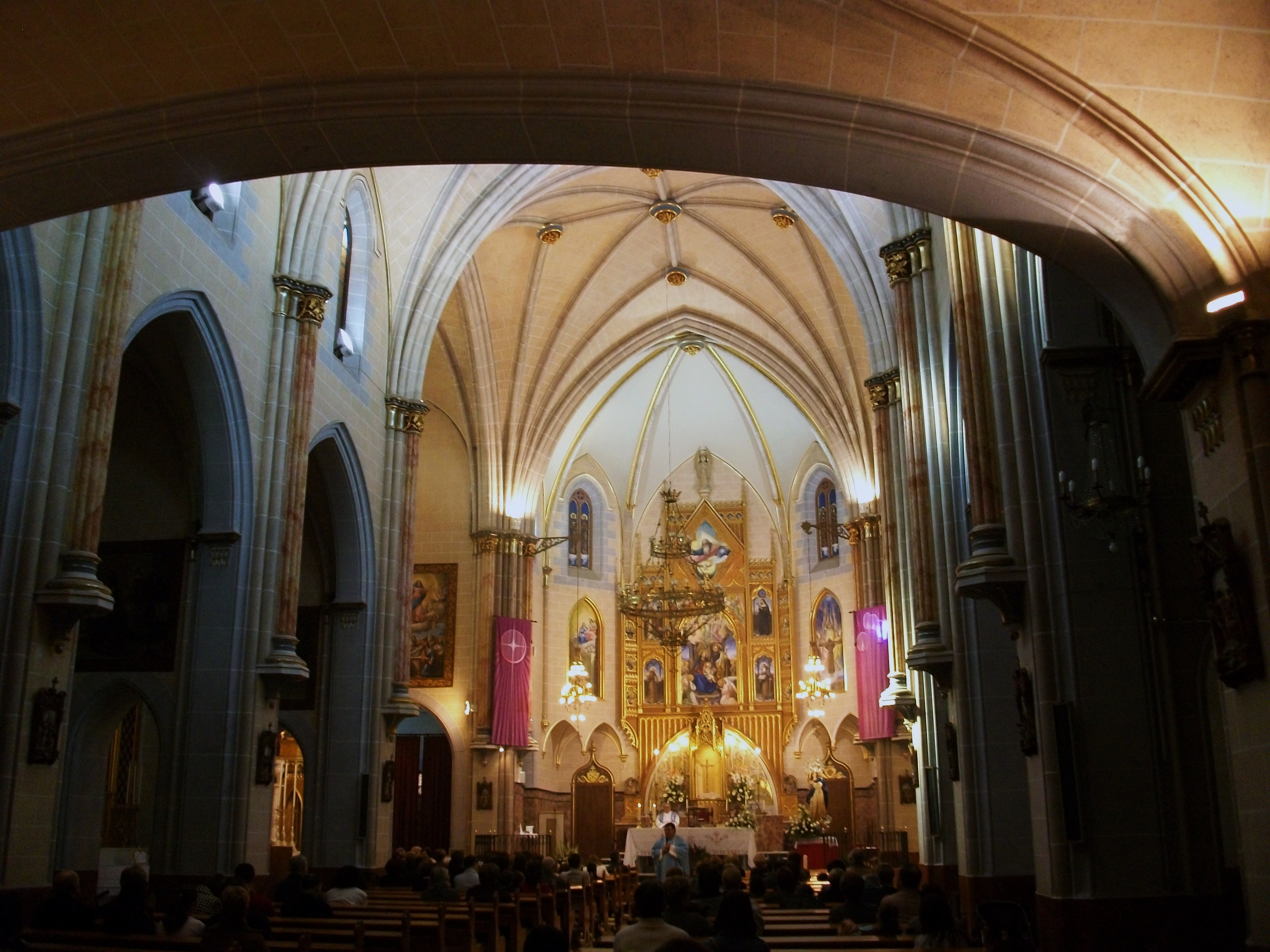 Interior de l'església neogòtica del convent franciscà de Pego, Marina Alta.